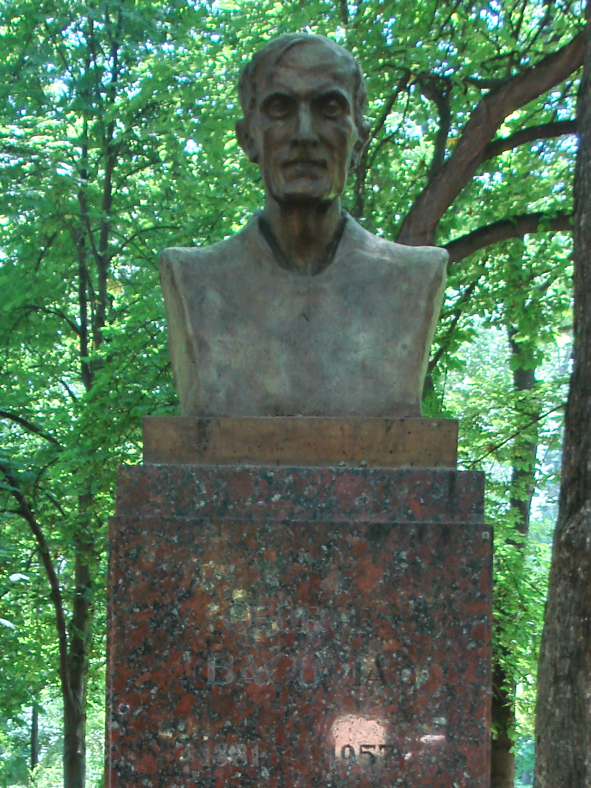 Бюст Джордже Баковии в Аллее Классиков